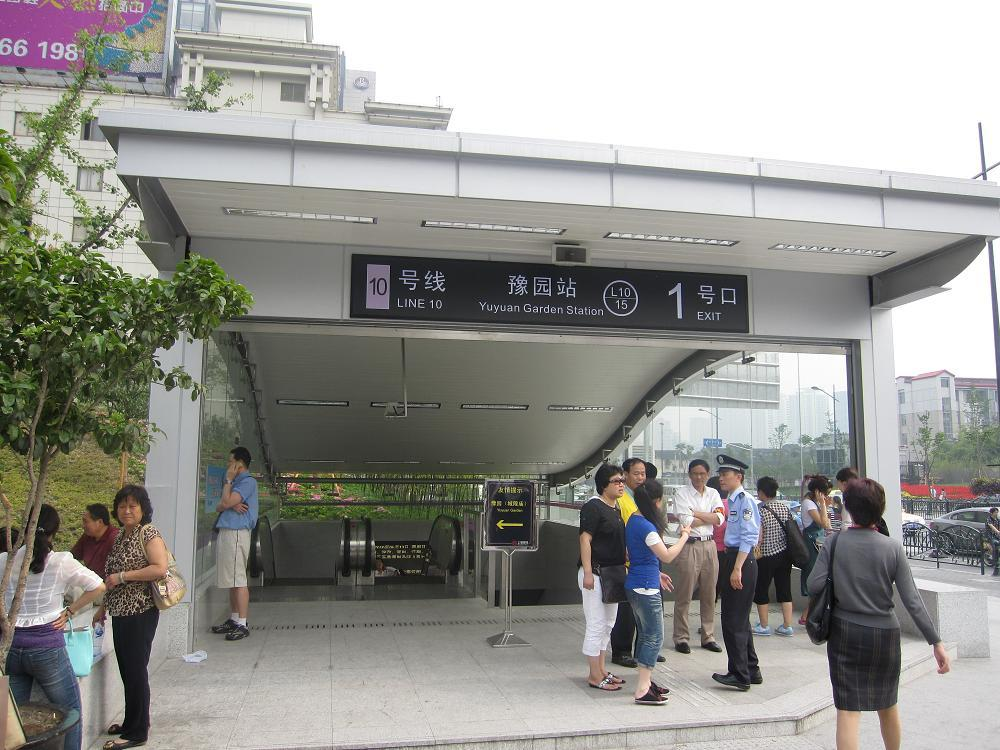 description